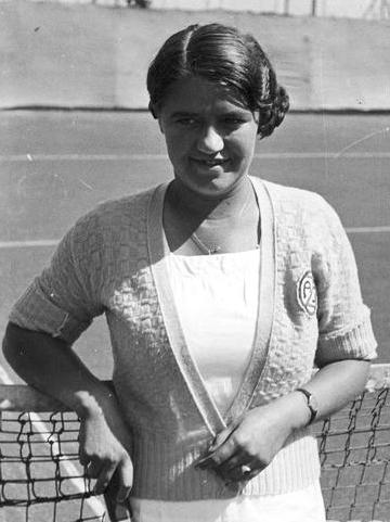 Tenisowe mistrzostwa Polski w Katowicach